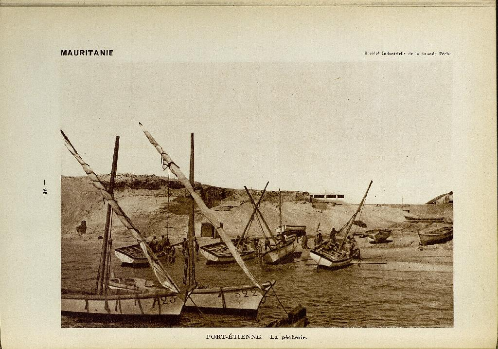 Le port de pêche de Port-Etienne en 1931.